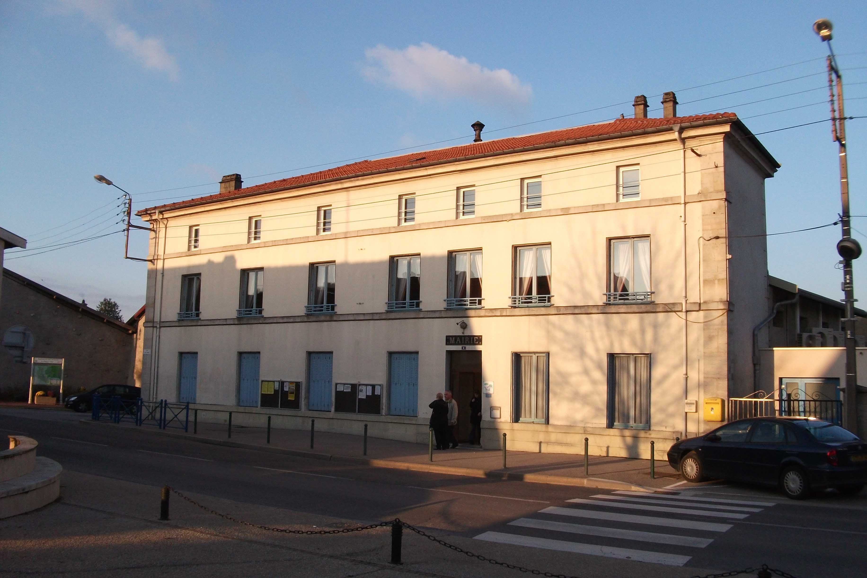 Mairie de la commune de Velaines.